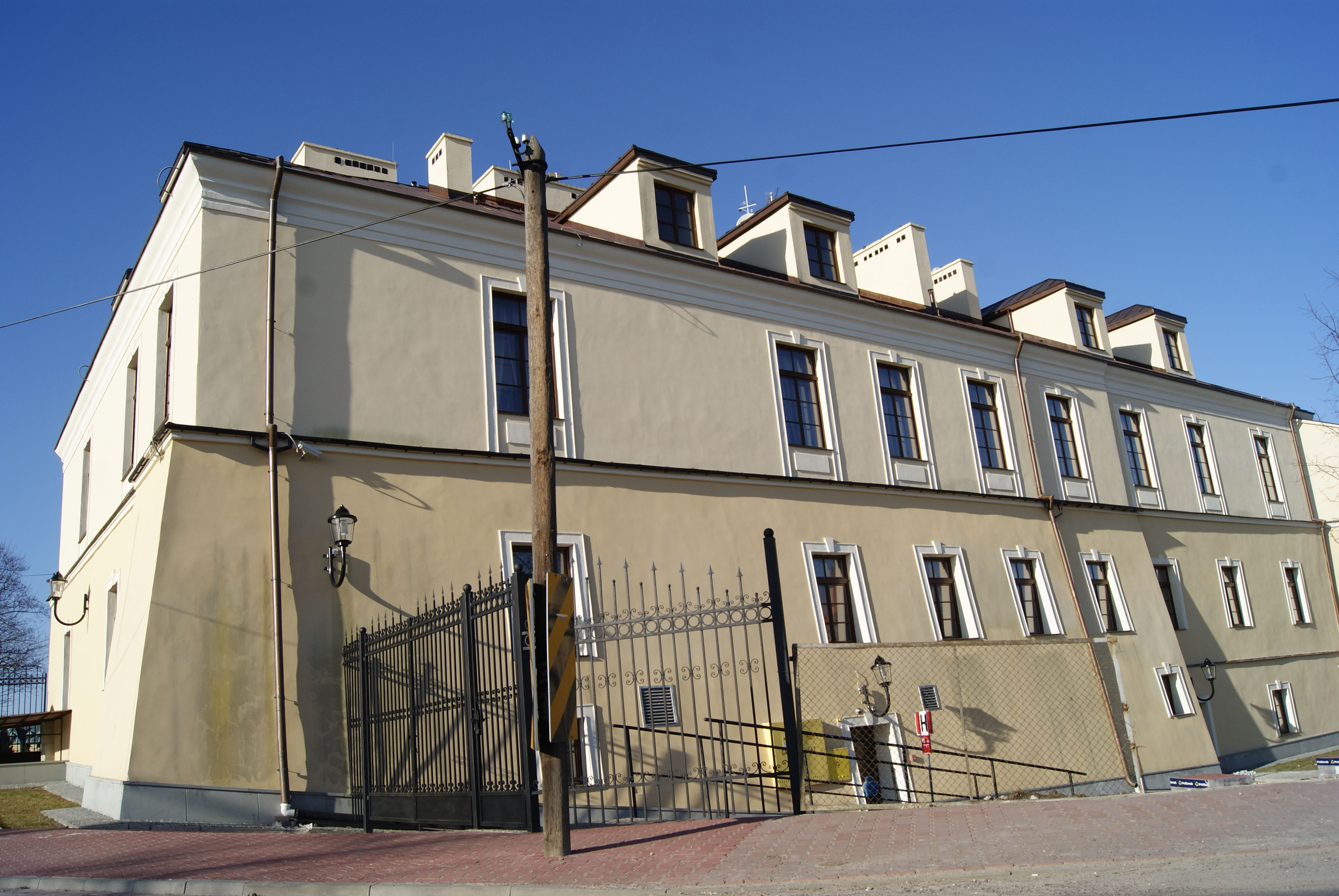 Relikty zamku w budynku magazynu Stopnica 76.